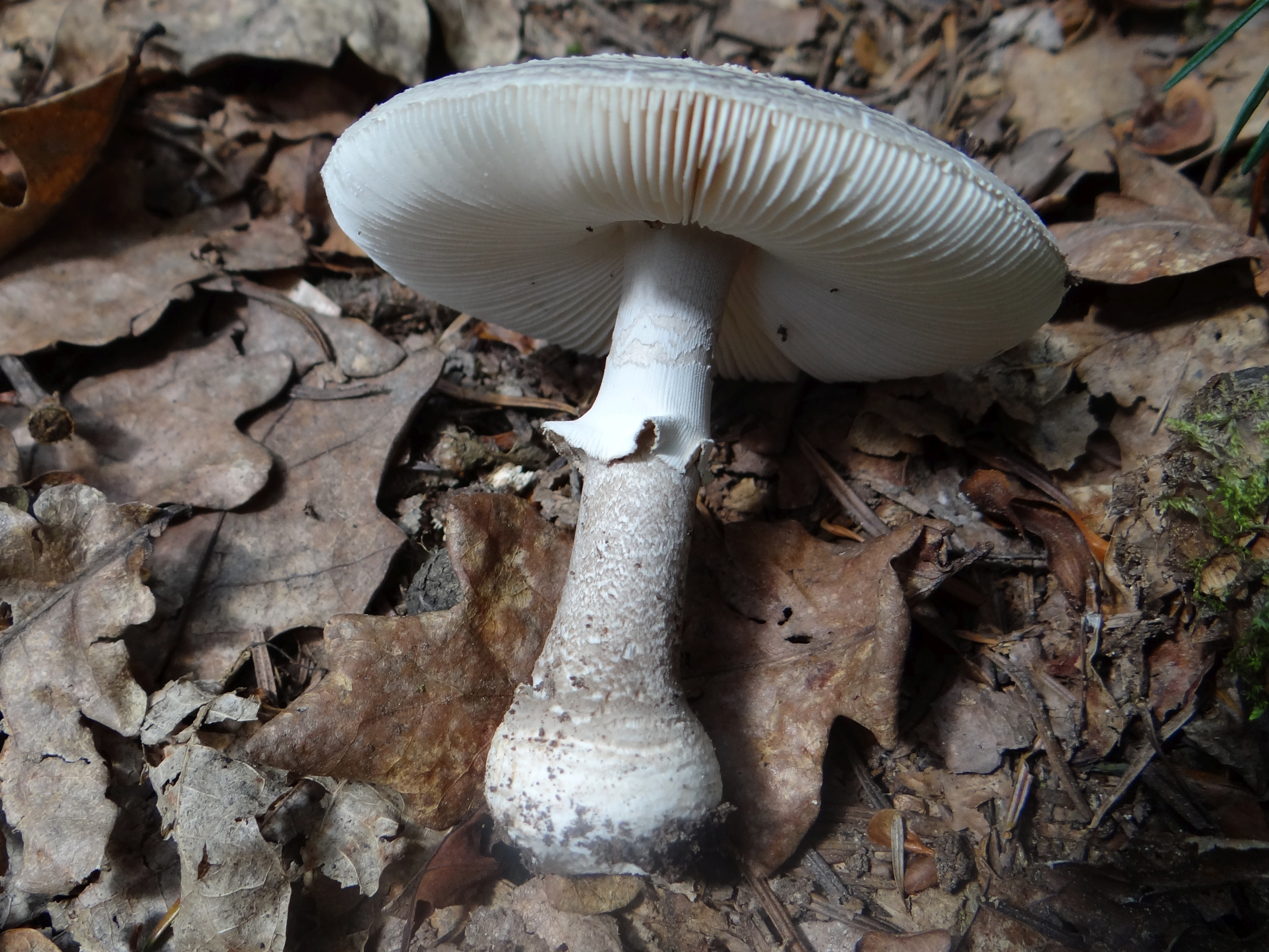 Amanita excelsa (location: Poland, Pogórze Wiśnickie, Cichawka)